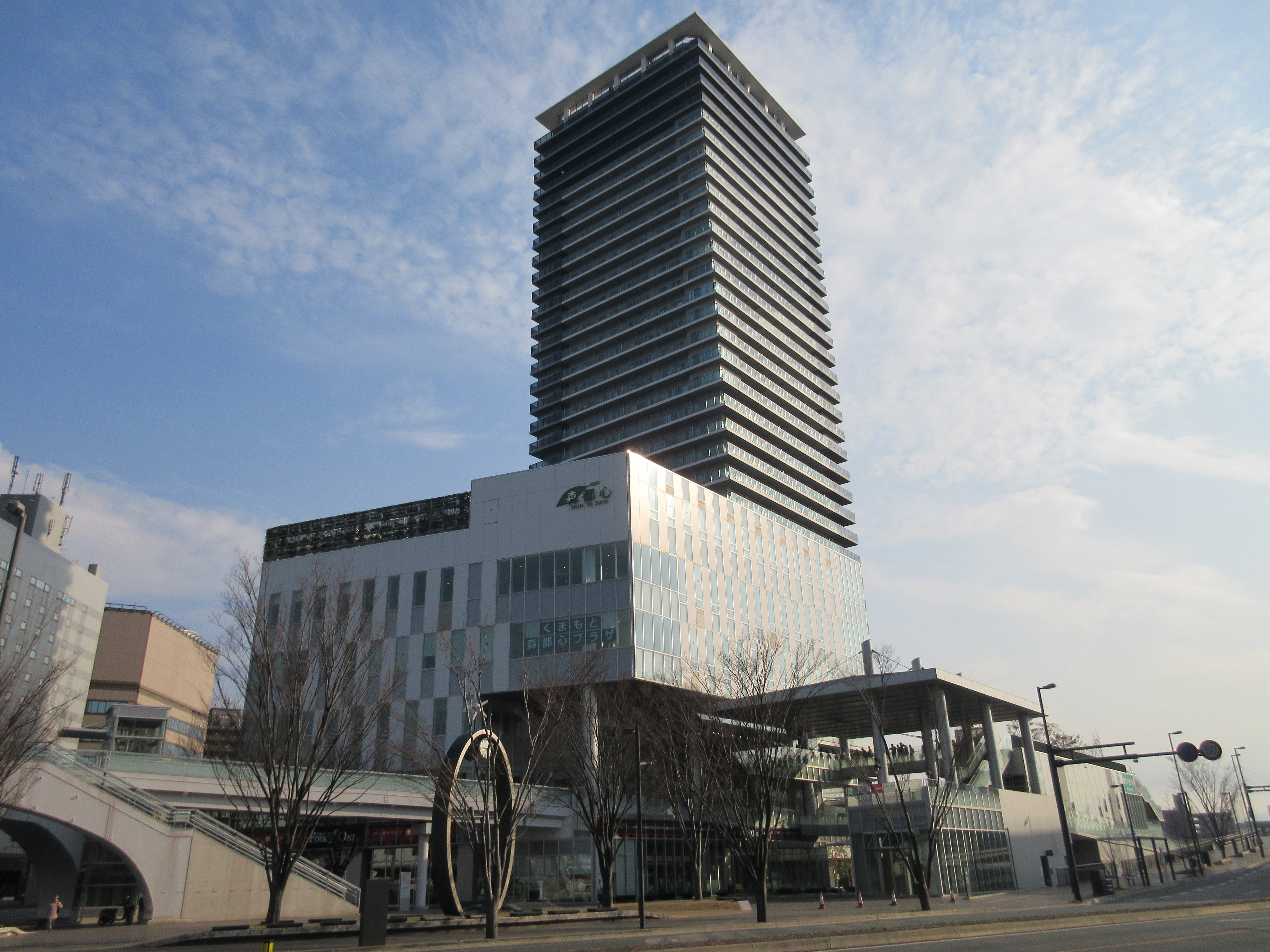 くまもと森都心